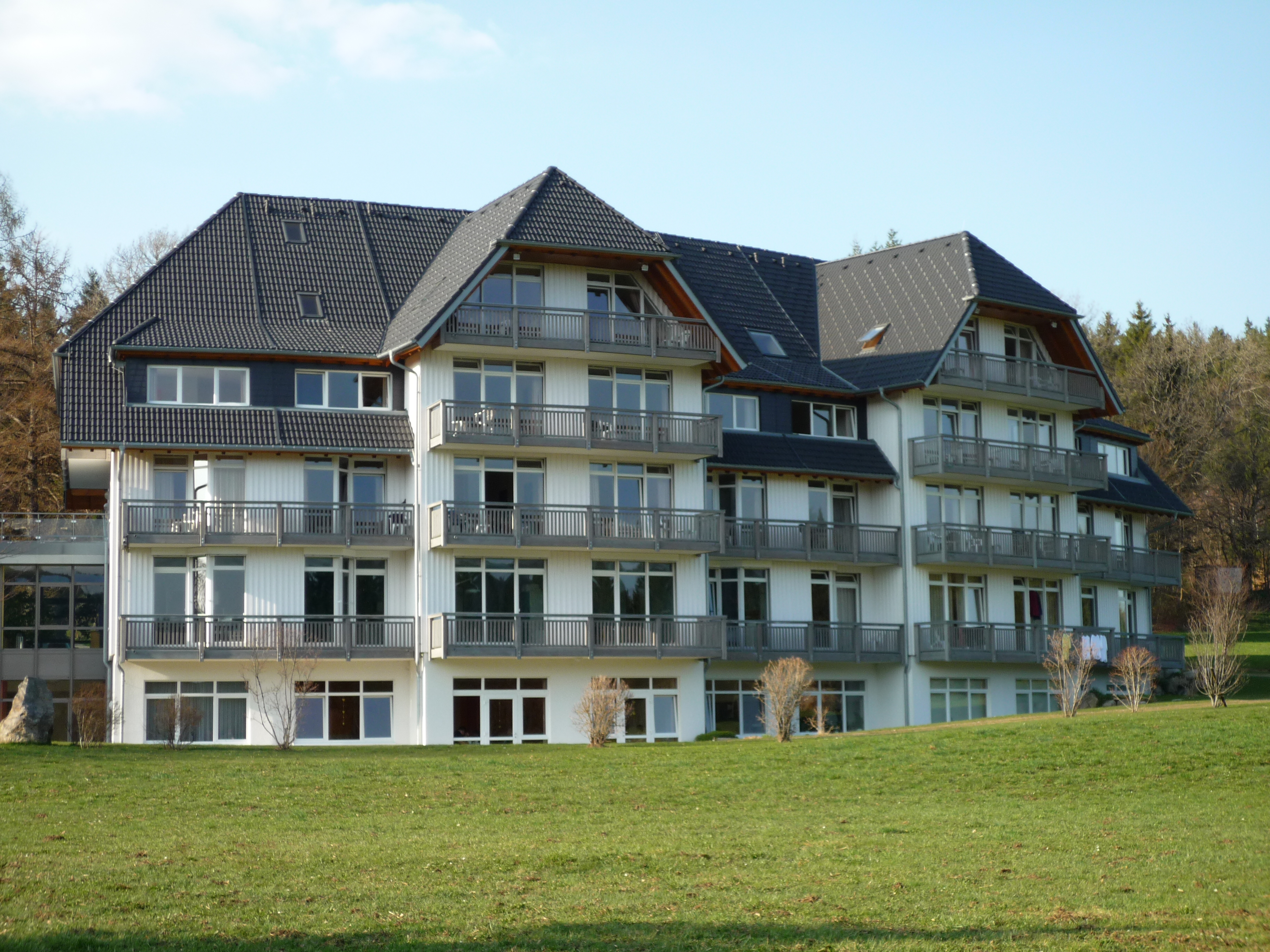 Földi-Klinik Hinterzarten